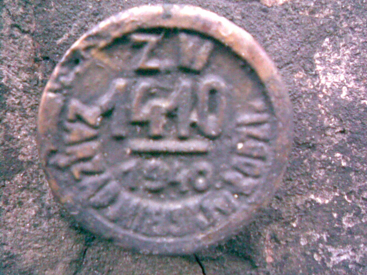 Reper ścienny